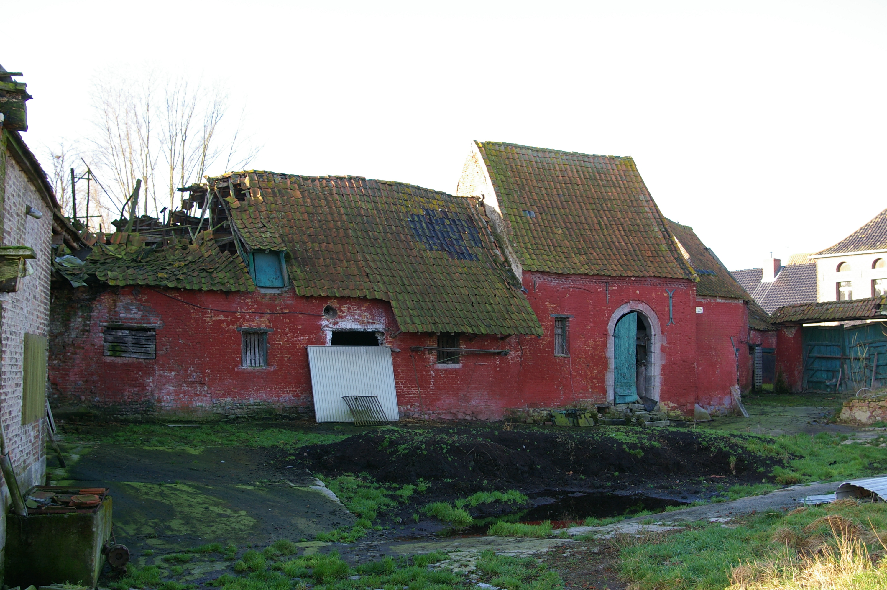 la "rouge" (ce qu'il en reste !)